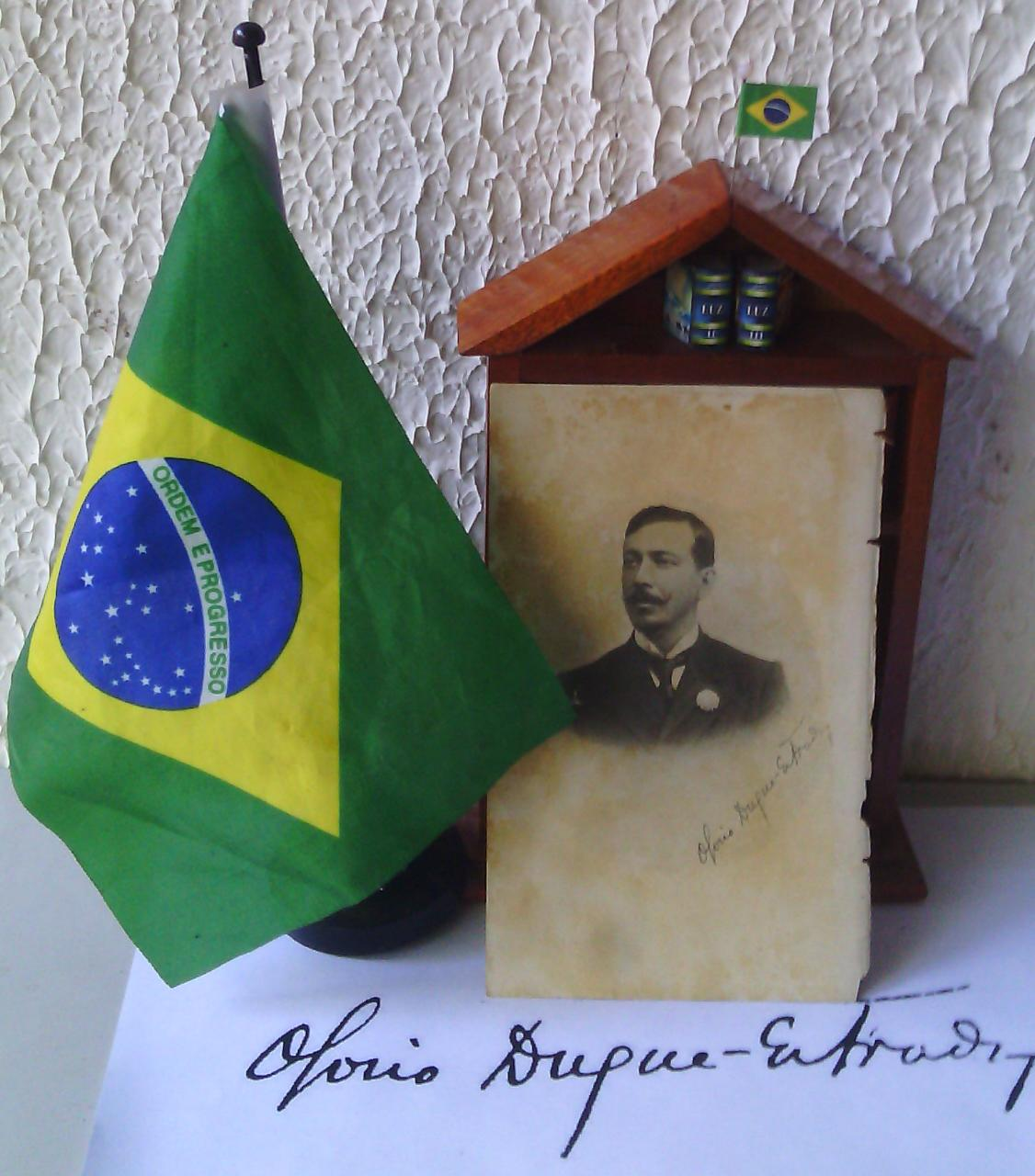 Material sobre Osório Duque-Estrada, o autor do Hino Nacional do Brasil. A fotografia é de 1902 do livro dele, Flora de maio, tem o autógrafo e bandeira do Brasil.